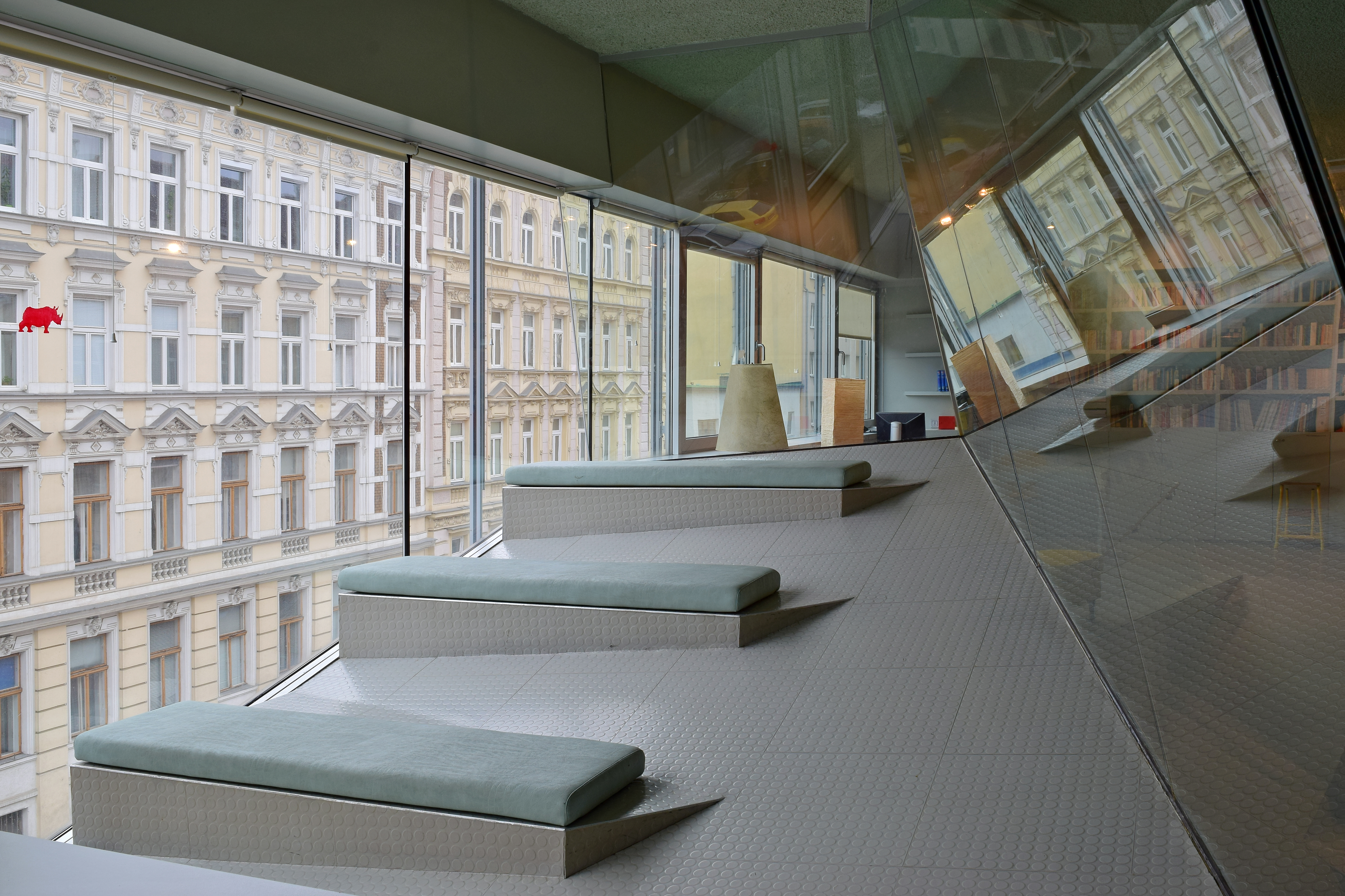 Schräge Ebene neben dem Essplatz der Gemeinschaftsküche Gemeinschaftswaschküche in der Miss Sargfabrik (dahinter die Bibliothek)